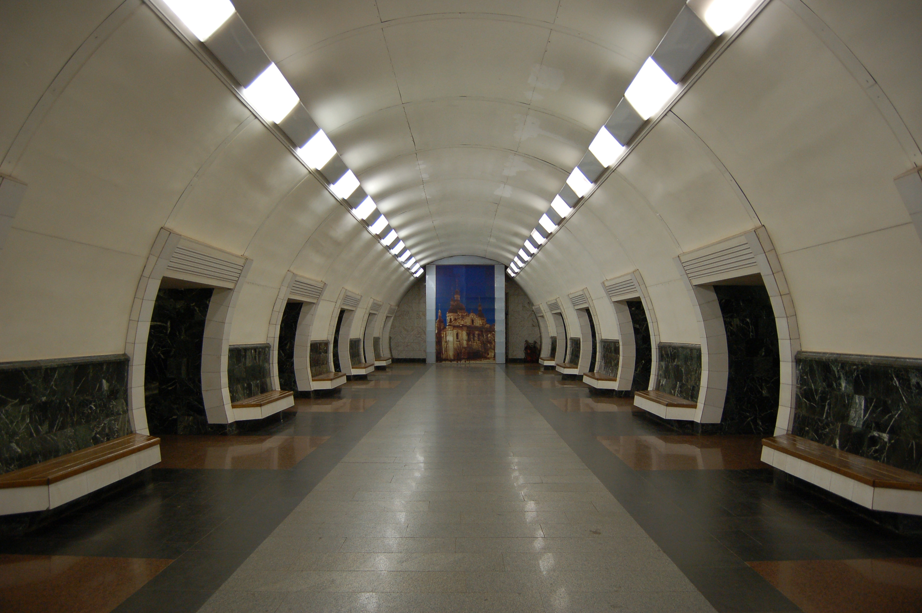 Станция метро «Дорогожичи», центральный зал